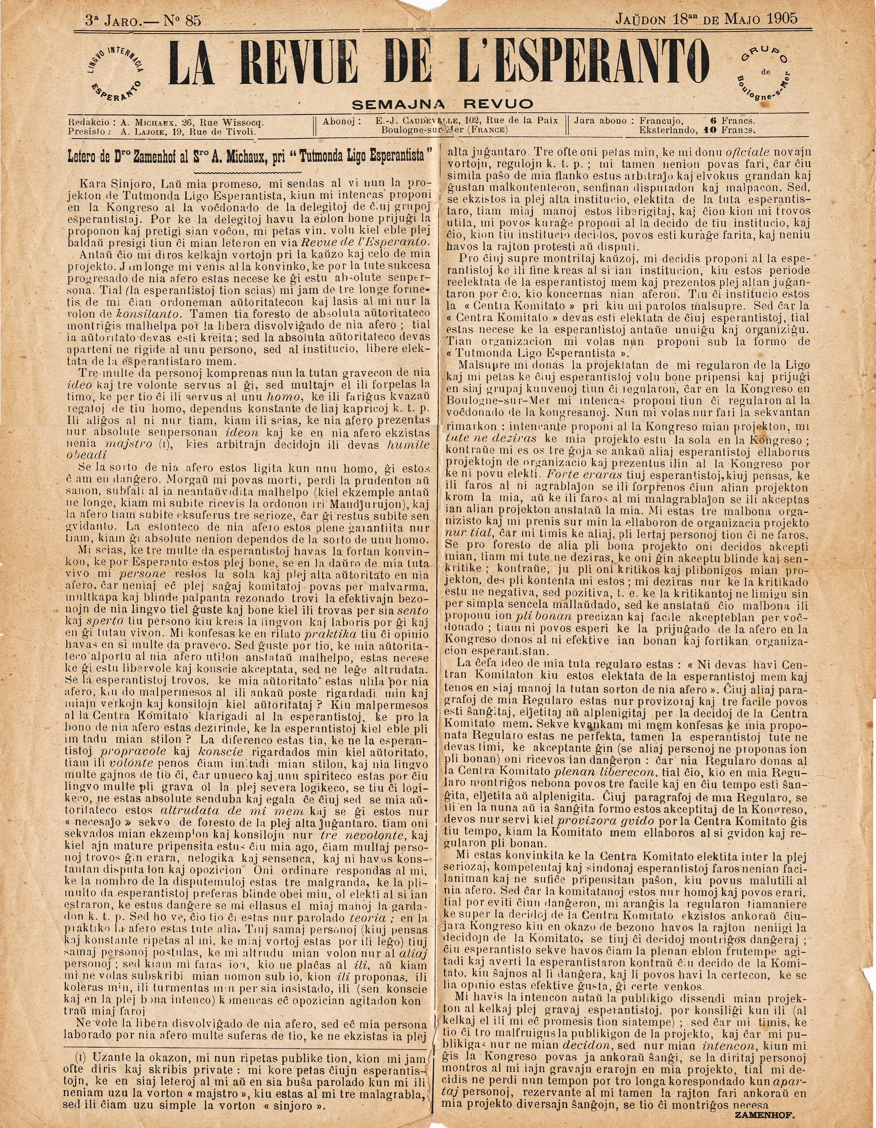 19O5 La Revue de l'Esperanto 1905-05-18 - Letero de Zamenhof al A.Michaux